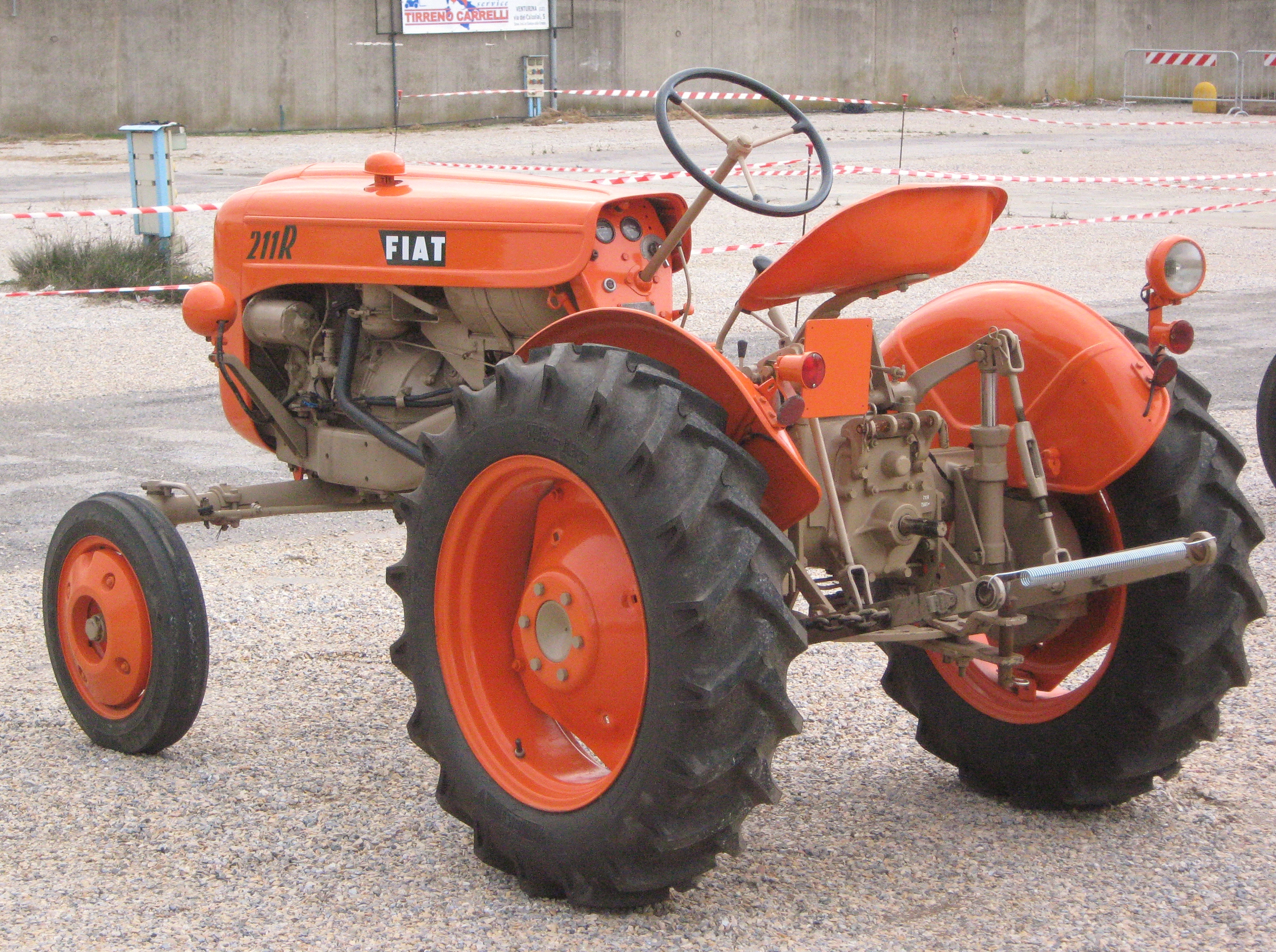 Trattore Fiat 211 R esposto all'Expo Model di Venturina (Provincia di Livorno) nel 2011